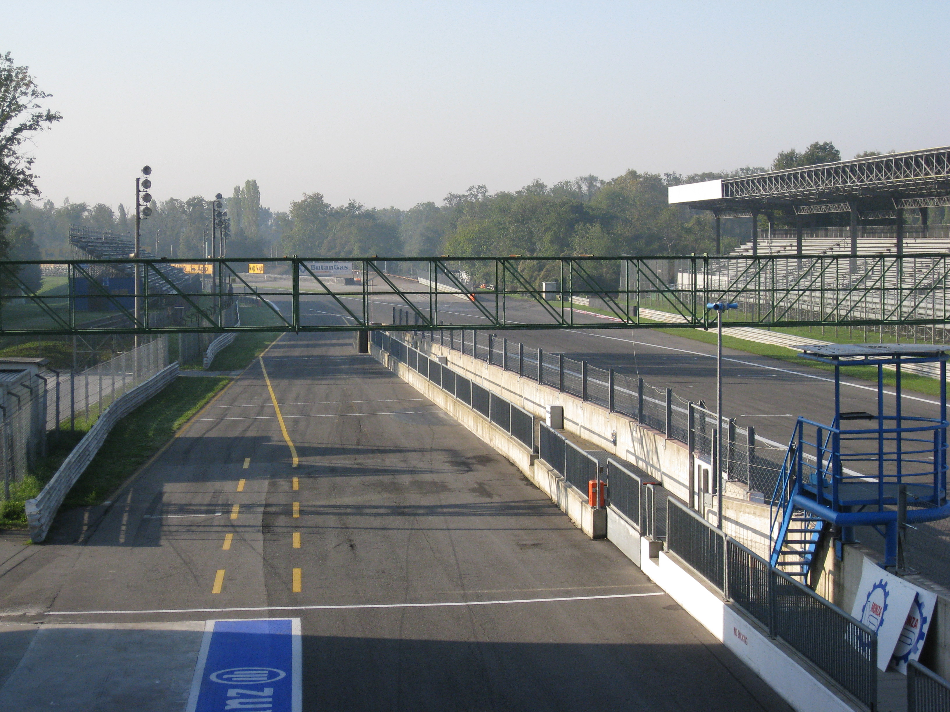 Circuito de Monza, entrada a rectaCircuito de Monza